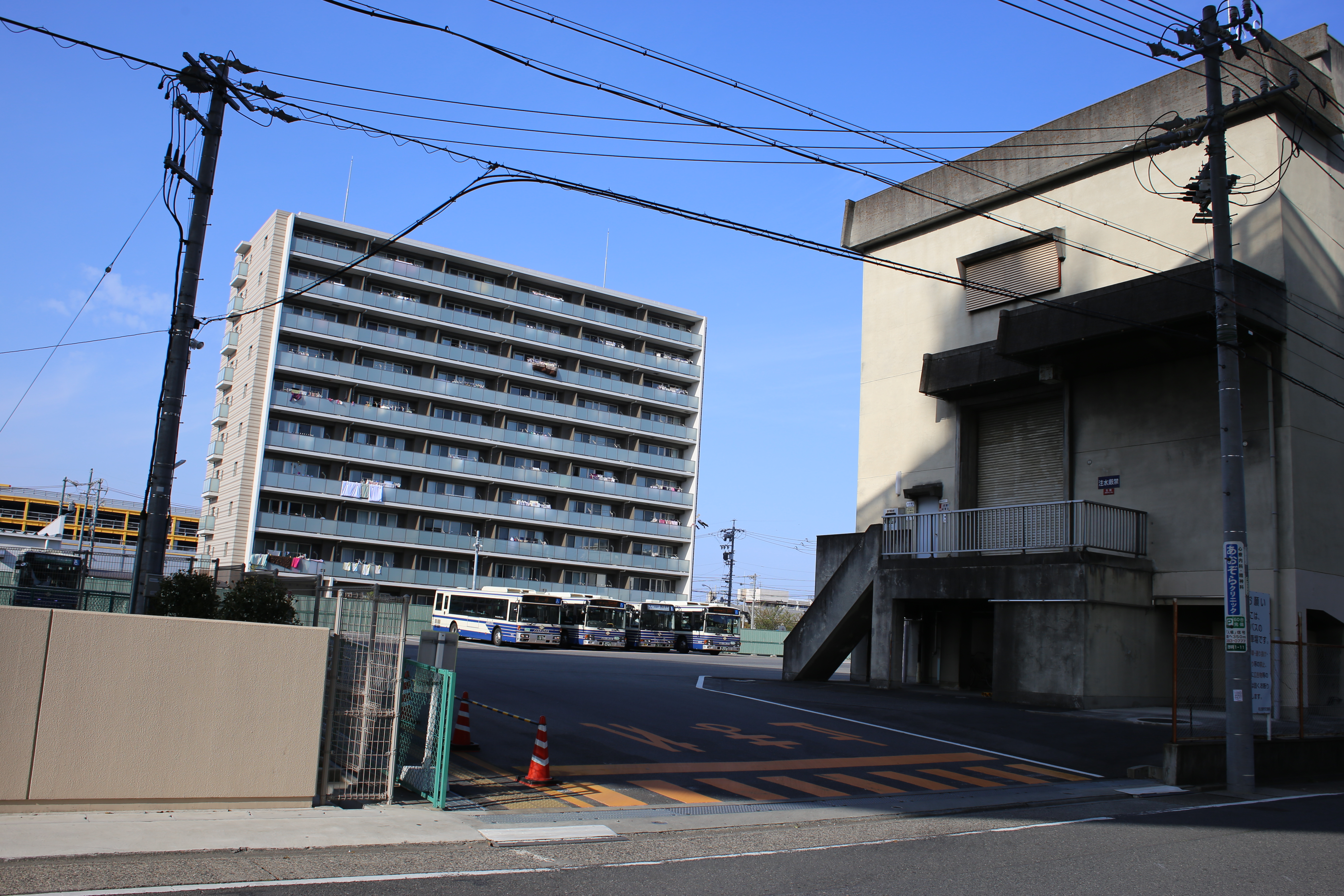 名古屋市港区港明一丁目の名古屋市営バス港営業所跡地に整備されたバス転回場・駐車場を南側公道西側より撮影